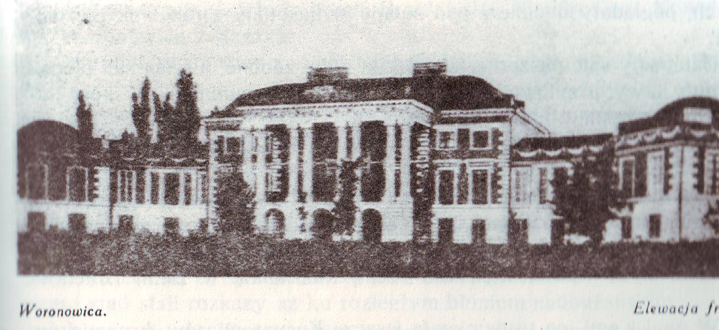 Woronowica - pałac Grocholskich